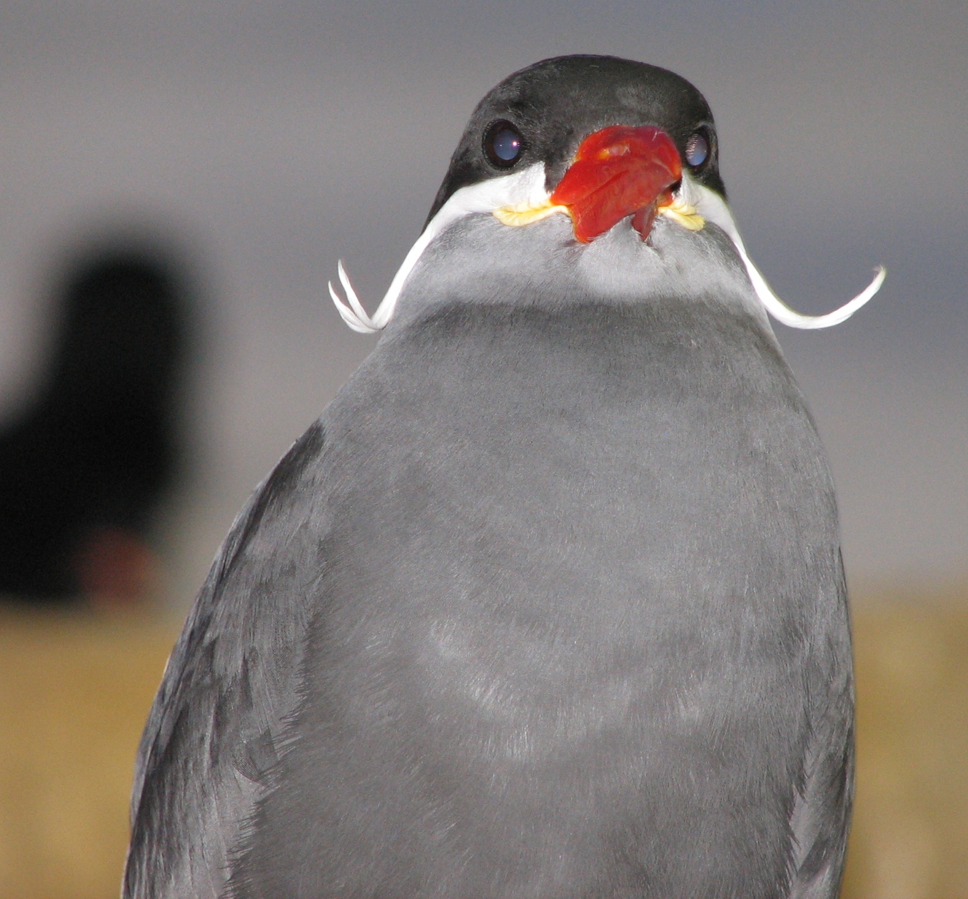 Inca Tern - Larosterna inca